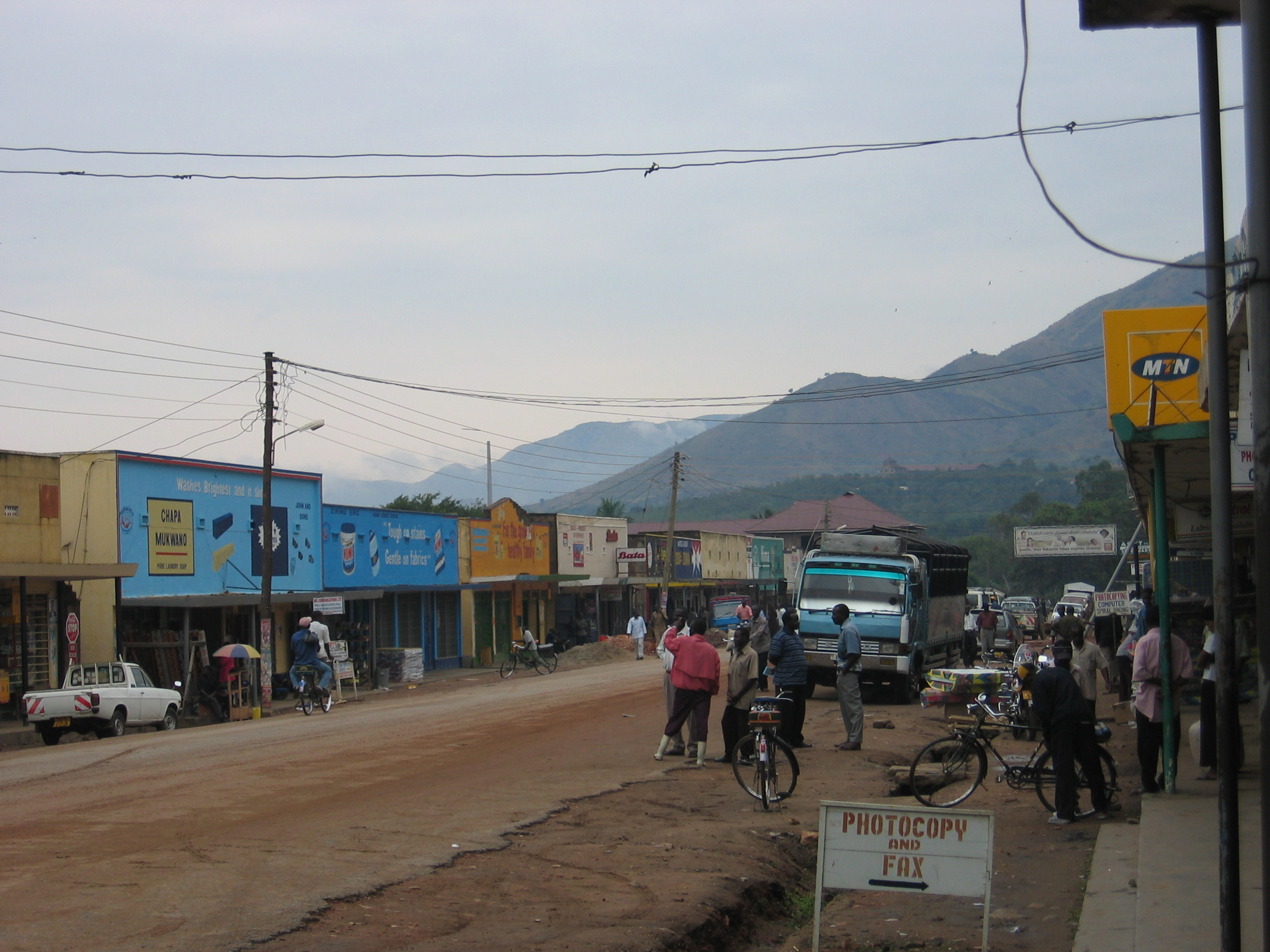 Kasese Uganda